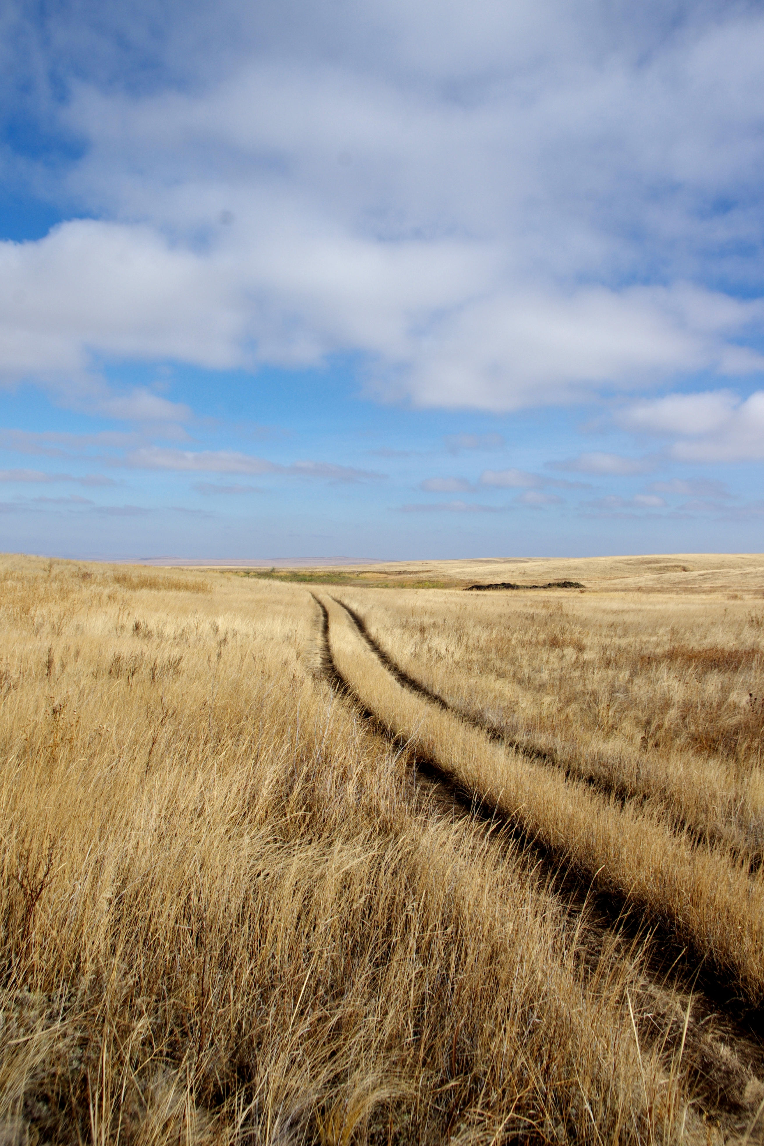 Буртинская степь осенью